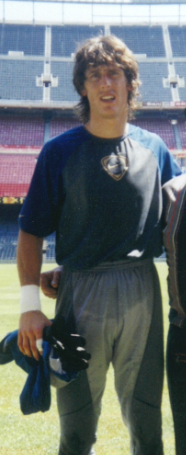 Richard Dutruel